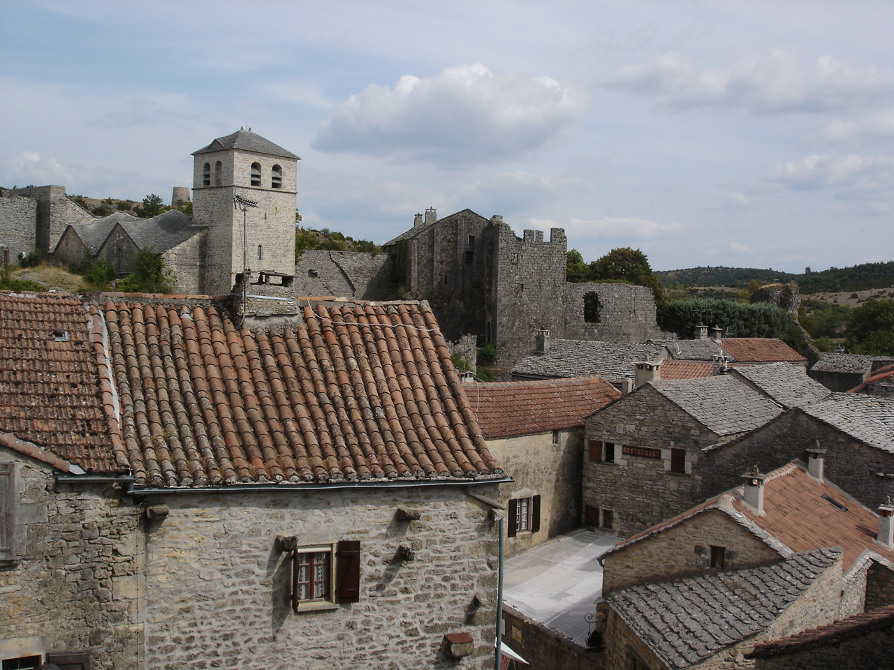 Vue de la Couvertoirade depuis le chemin de ronde.